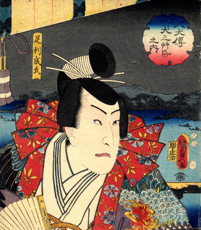 1852 portrait of Ashikaga Shigeuji, Koga Kubo.